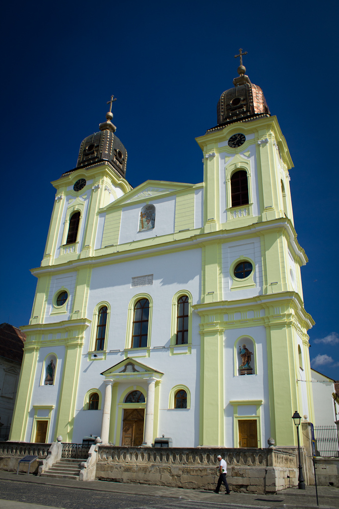 Catedrala greco-catolică "Sf. Treime"